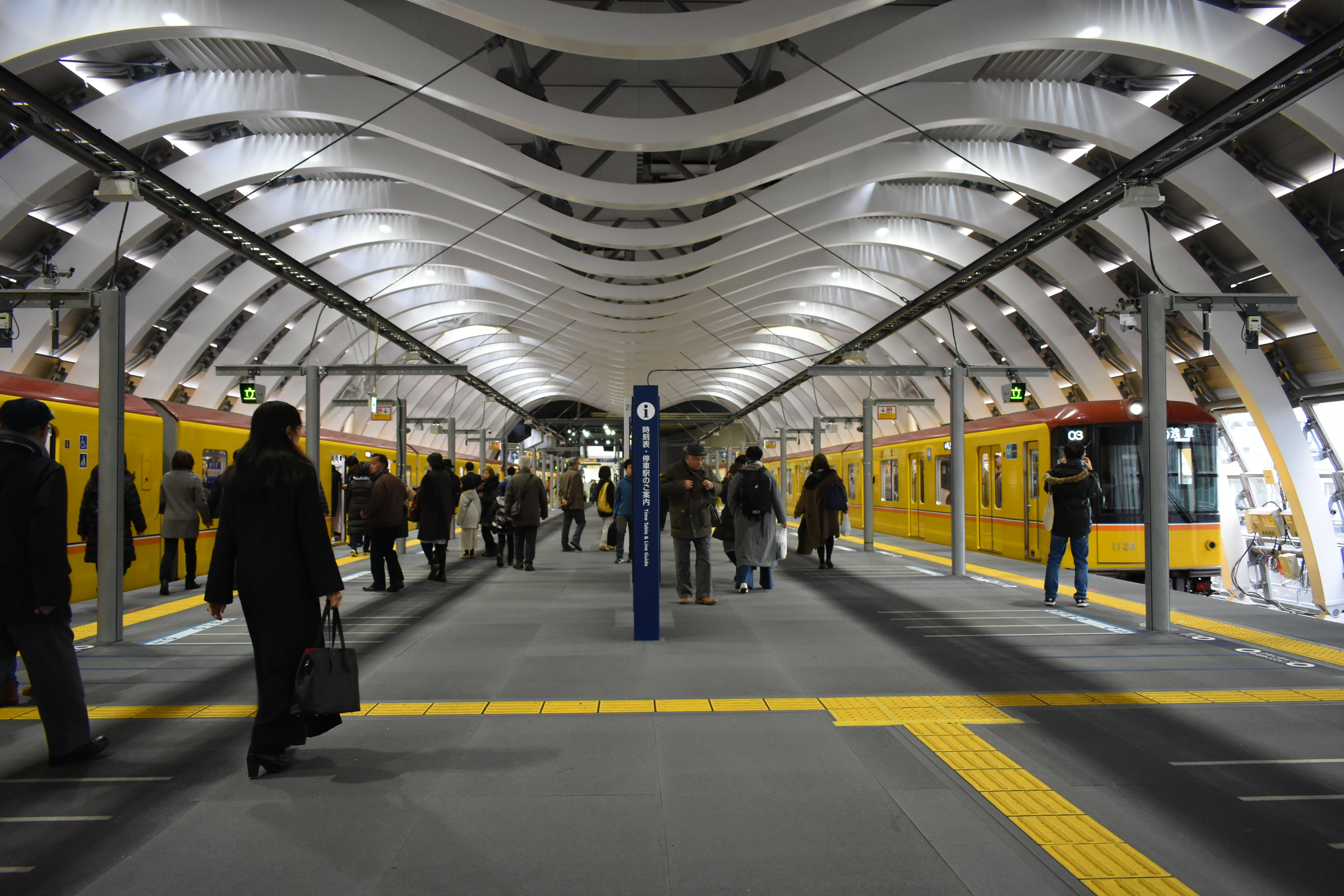 東京メトロ 銀座線 渋谷駅